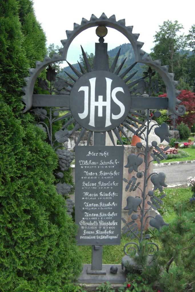 Grab des Bergsteigers Toni Kinshofer (1934-1964) auf dem Bergfriedhof in Bad Wiessee